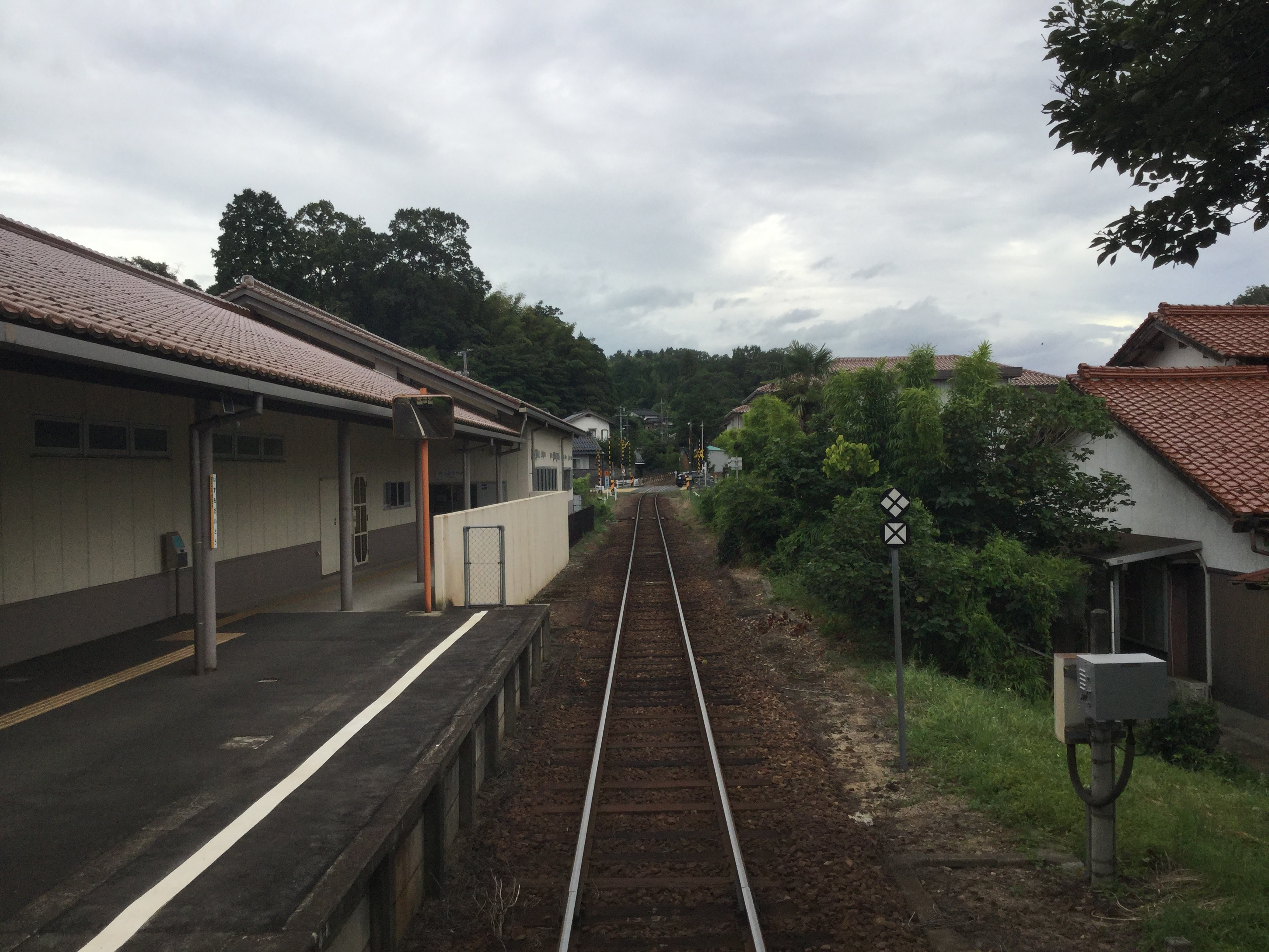 Izumo Daitō Station (出雲大東駅)